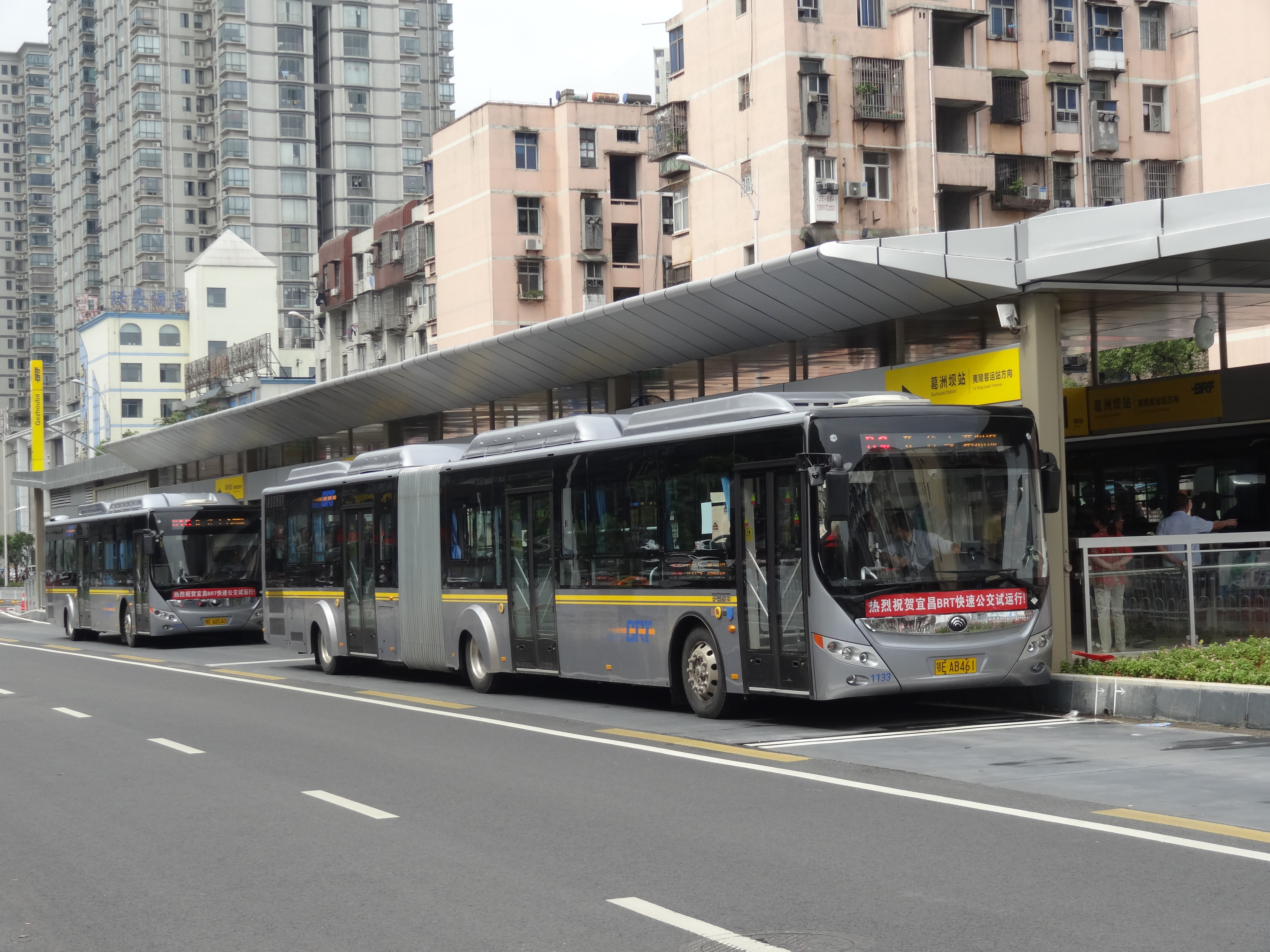 中文（中国大陆）: 停靠在葛洲坝站的宜昌BRT车辆。